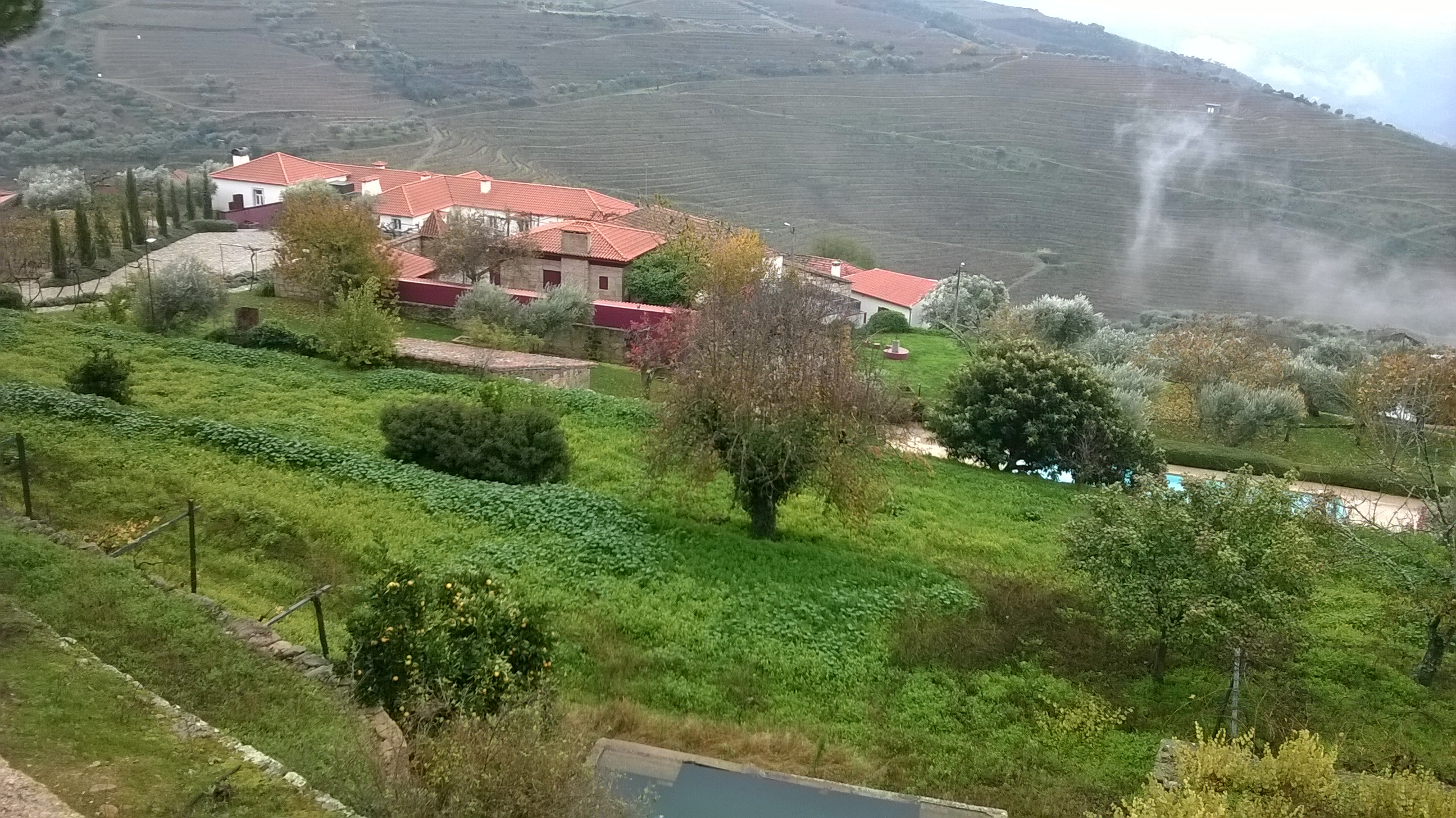 Castanheiro, 5140, Portugal